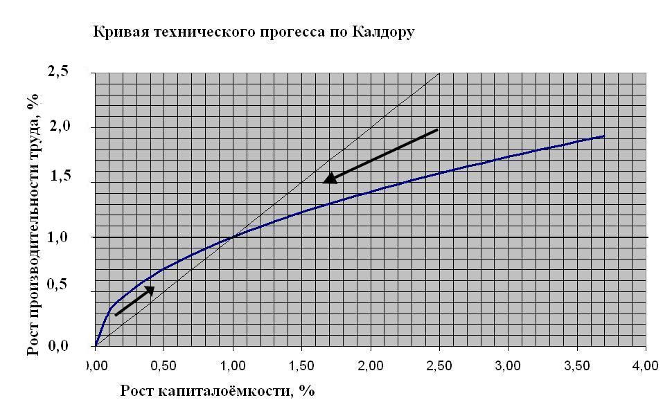 кривая Калдора исправленная